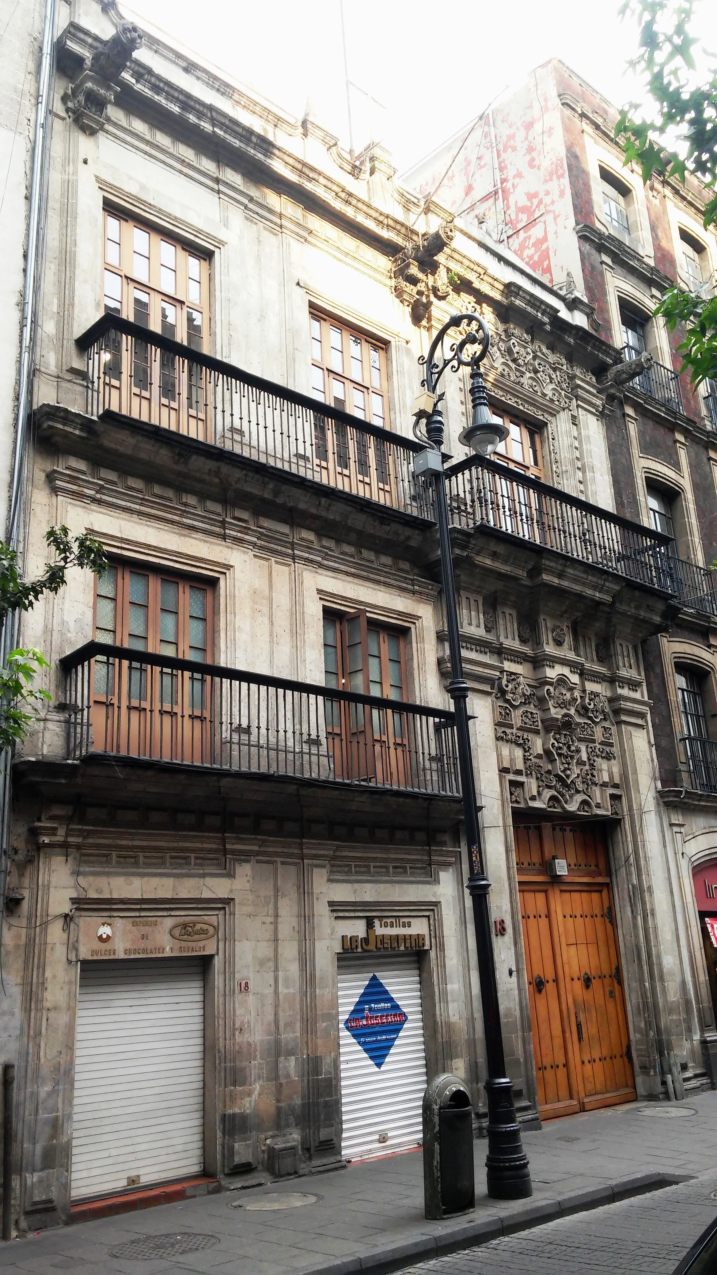 Casa del alférez Cobián en el centro histórico de la Ciudad de México